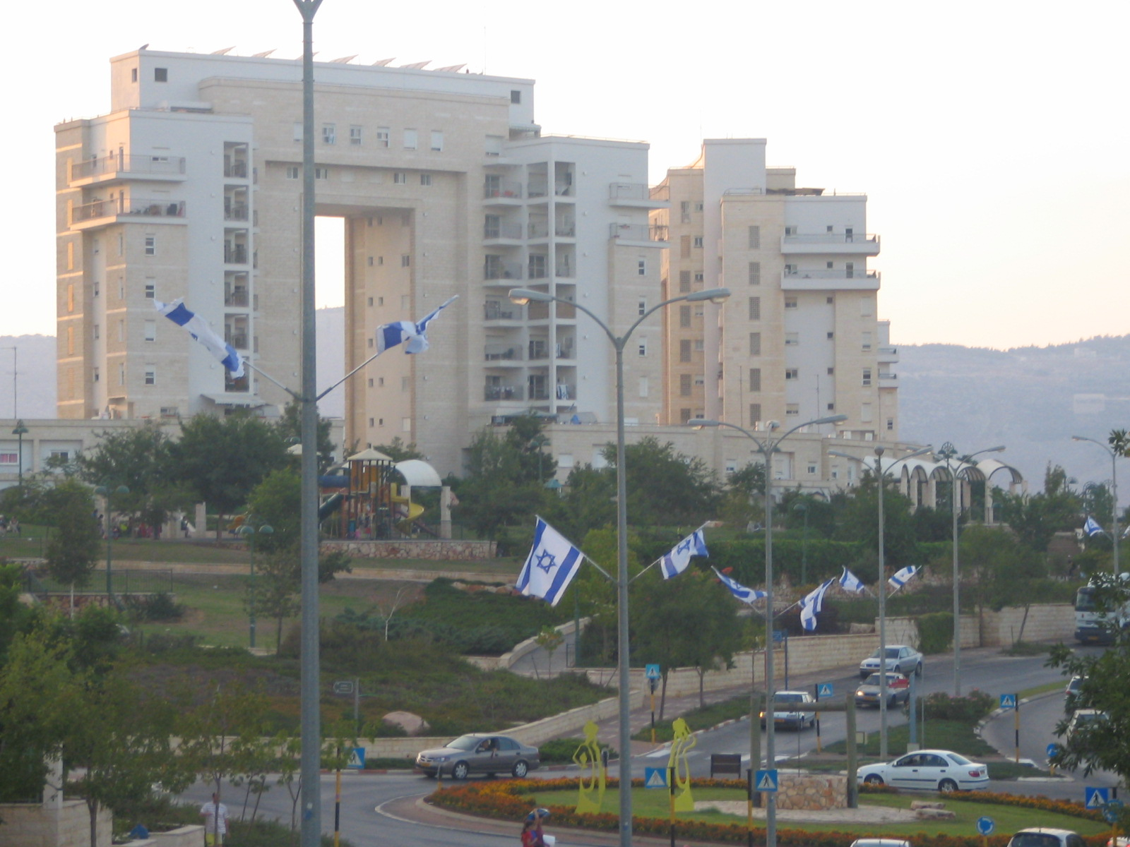 Karmi'el. City in Israel. Ramat-Rabin district. September 2006 Кармиэль. Город в Израиле. Район Рамат-Рабин. Сентябрь 2006 כרמיאל. שכונת רבין. סמפטמבר 2006.